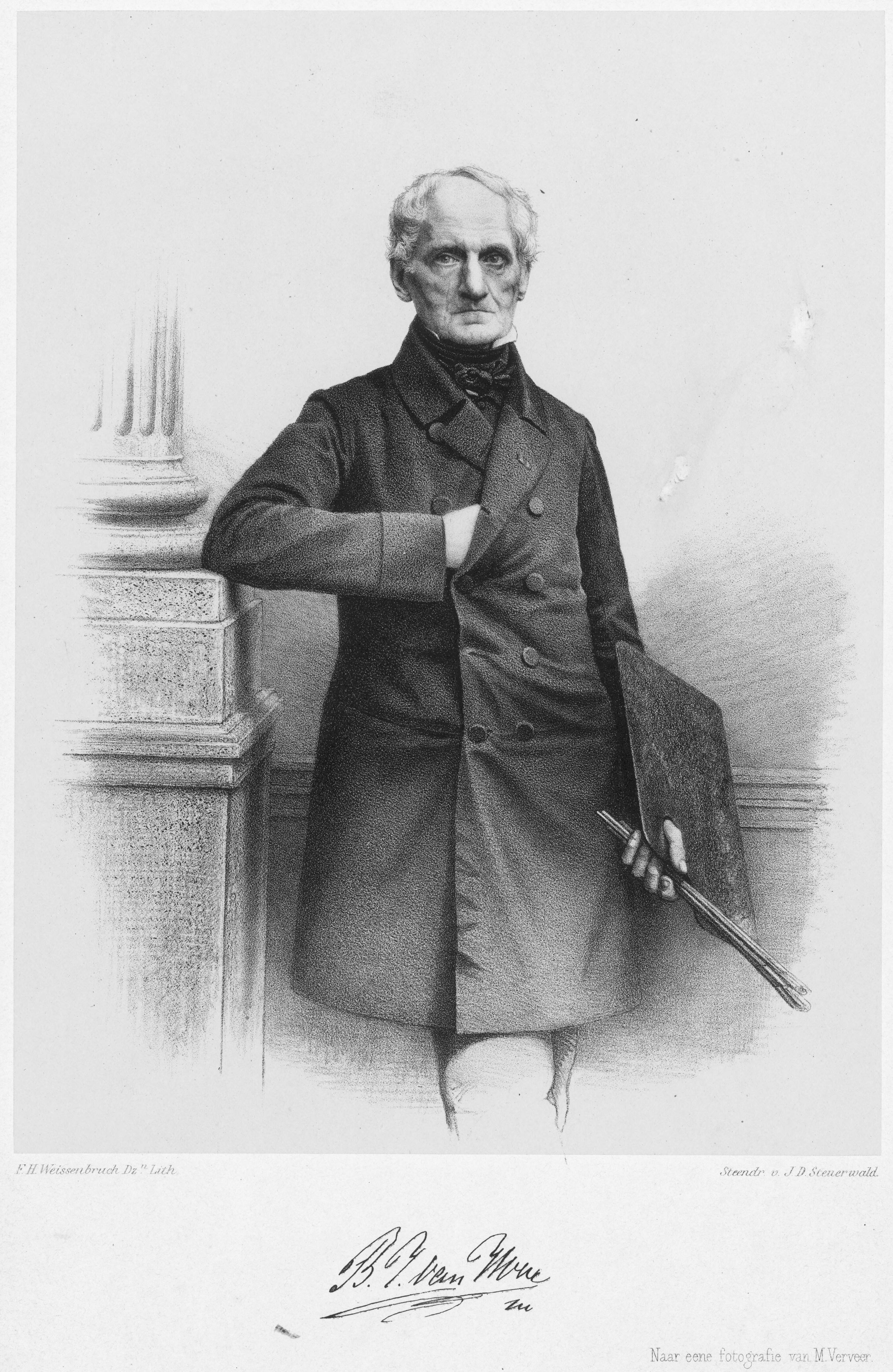 Bartholomeus Johannes van Hove (1790-1880), geportretteerd door Frederik Hendrik Weissenbruch. Onder het portret de handtekening van Van Hove.